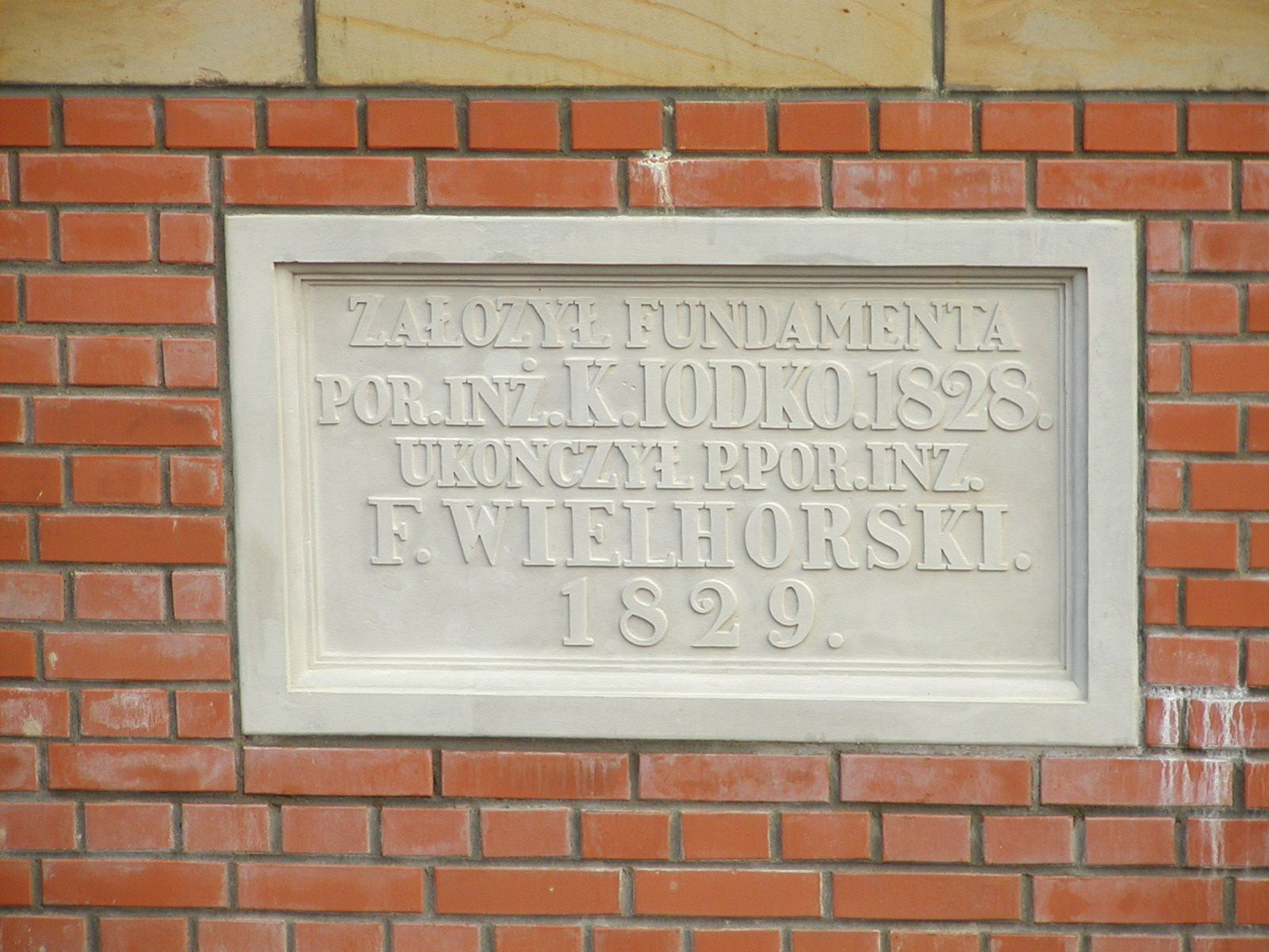 Śluza Kurzyniec na Kanale Augustowskim, tablica